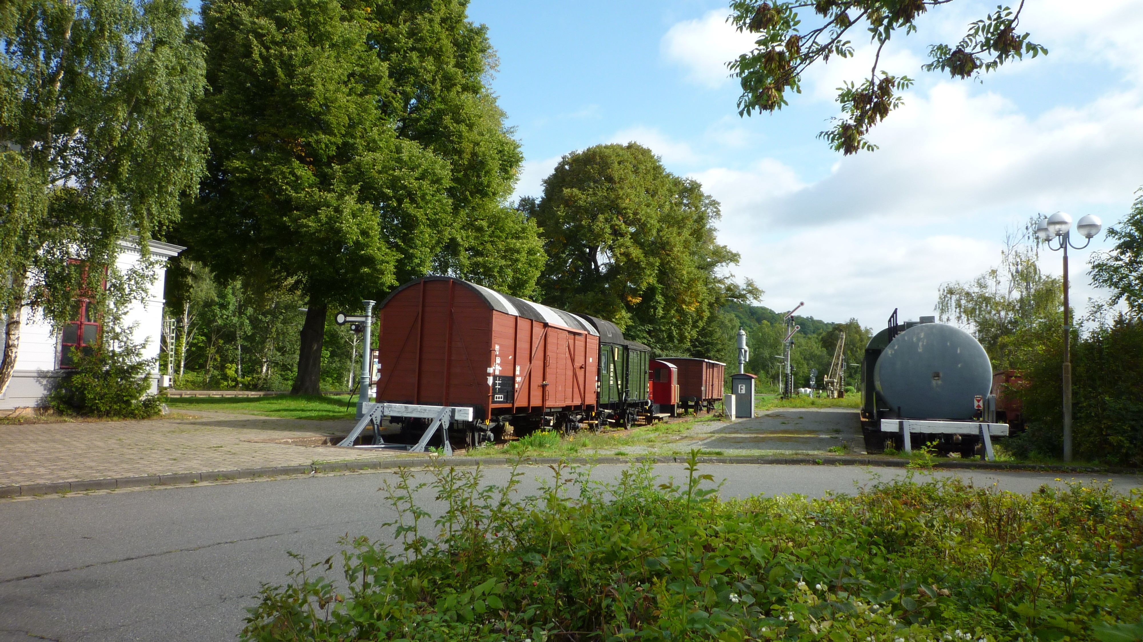 Vienenburg - Ältester Bahnhof Deutschlands um 1840, Eisenbahnmuseum